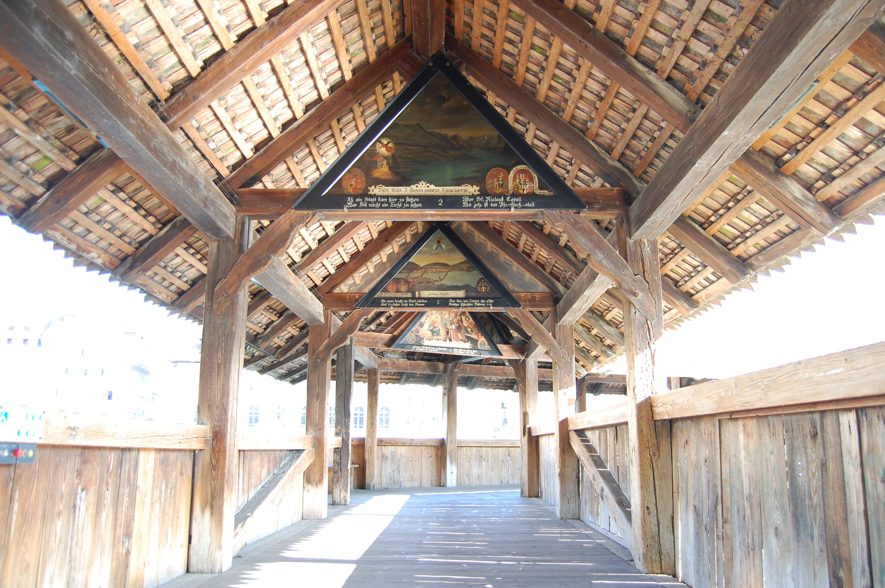 Kapellbrucke in Lucerne